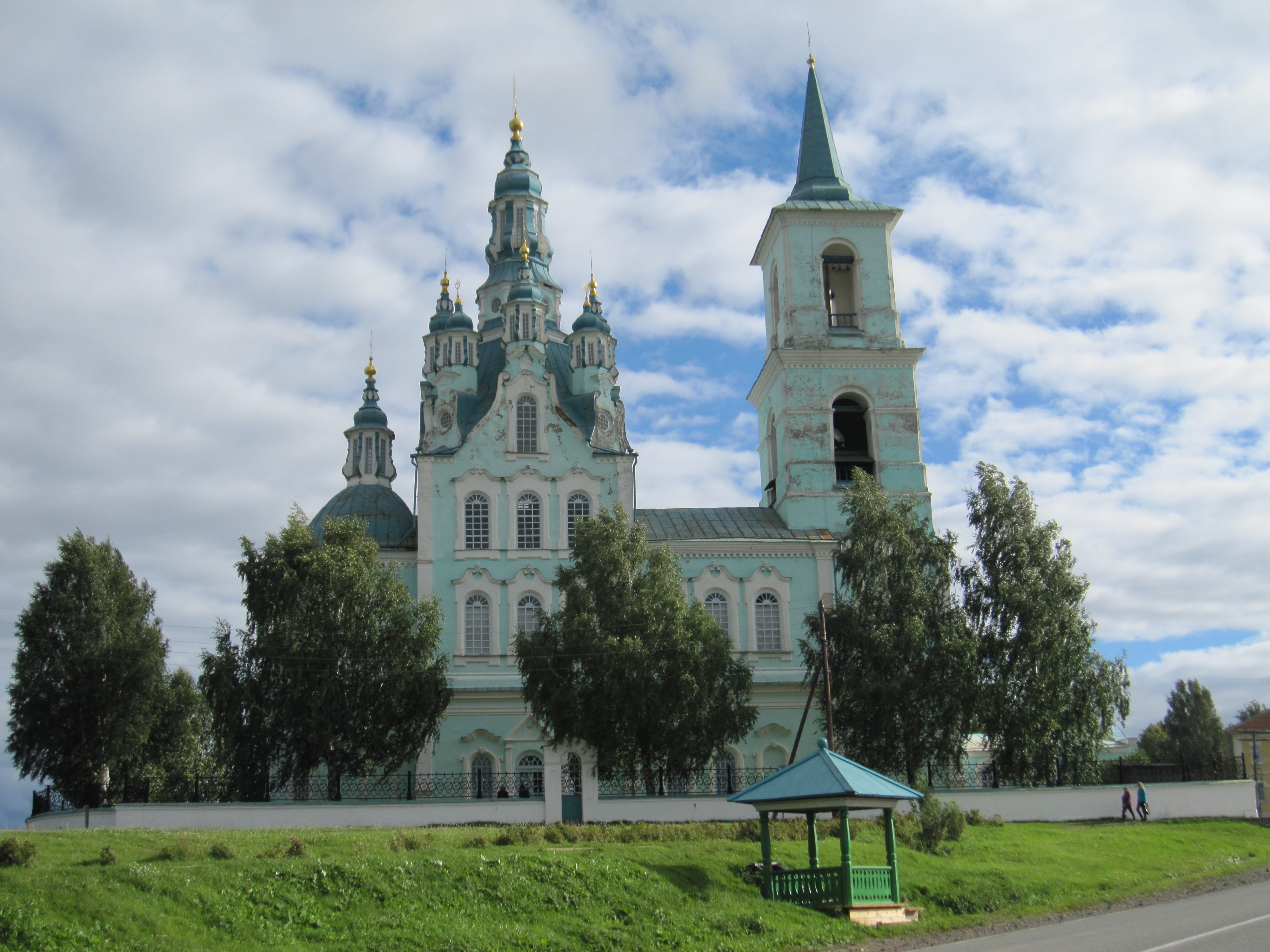 Церковь Спаса Преображения: Нижняя Синячиха, Алапаевский район, Свердловская область